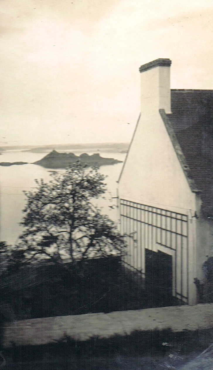 La ria de la Rance depuis la maison servannaise de l'académicien Louis Duchesne (1843-1922), avant la construction du barrage de la Rance.